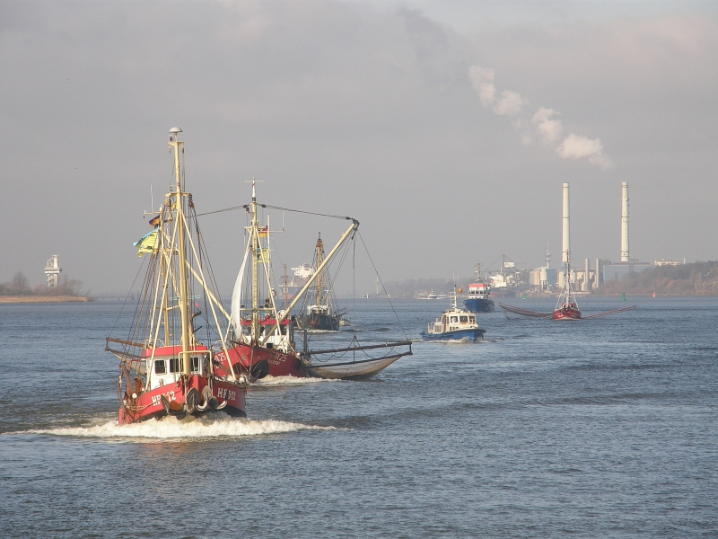 Elbfischerdemo auf der Elbe bei Blankenesse